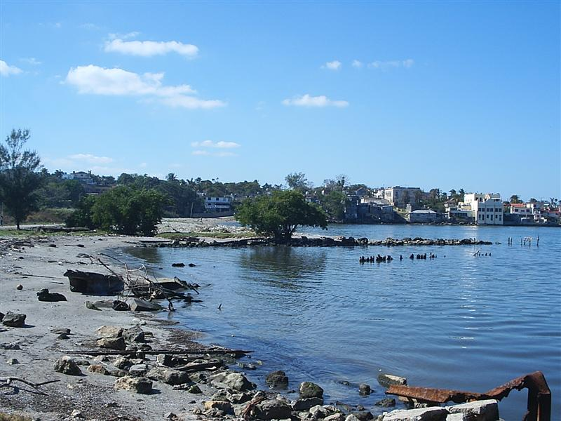 El cachon era una de las playas mas hermosas q avia en cuba, inclusive muchos medocos de toda parte de cuba mandaban a los pasientes a bañarcer en el cachon por ser una de las aguas mas medicinales y con alta cantidad de salitre, la verdad q el con los años ya uno no pude ni pescar ahy. Esa playa altualmente es usada para los entrenamientos de caya, canoa, lucha greco, entre otras actividades de no muy alta calidad. Osiel el cojimero Tambien se usa para pescar cangrejos, bueno anteriormente, ya ni eso hay, y mas que por ahi pasan los barcos.